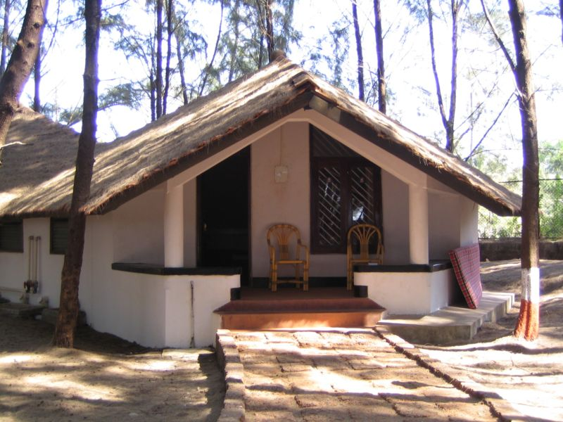 MTDC resort at Tarkarli